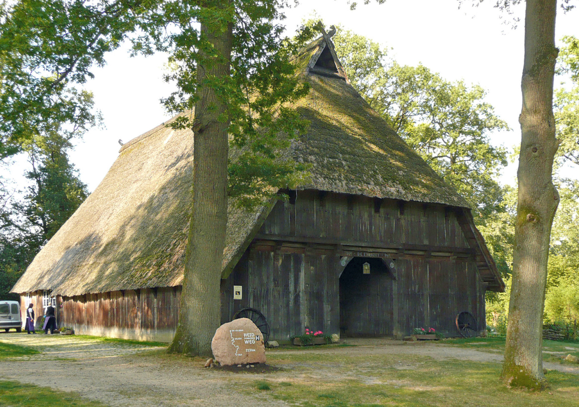 De Emhoff